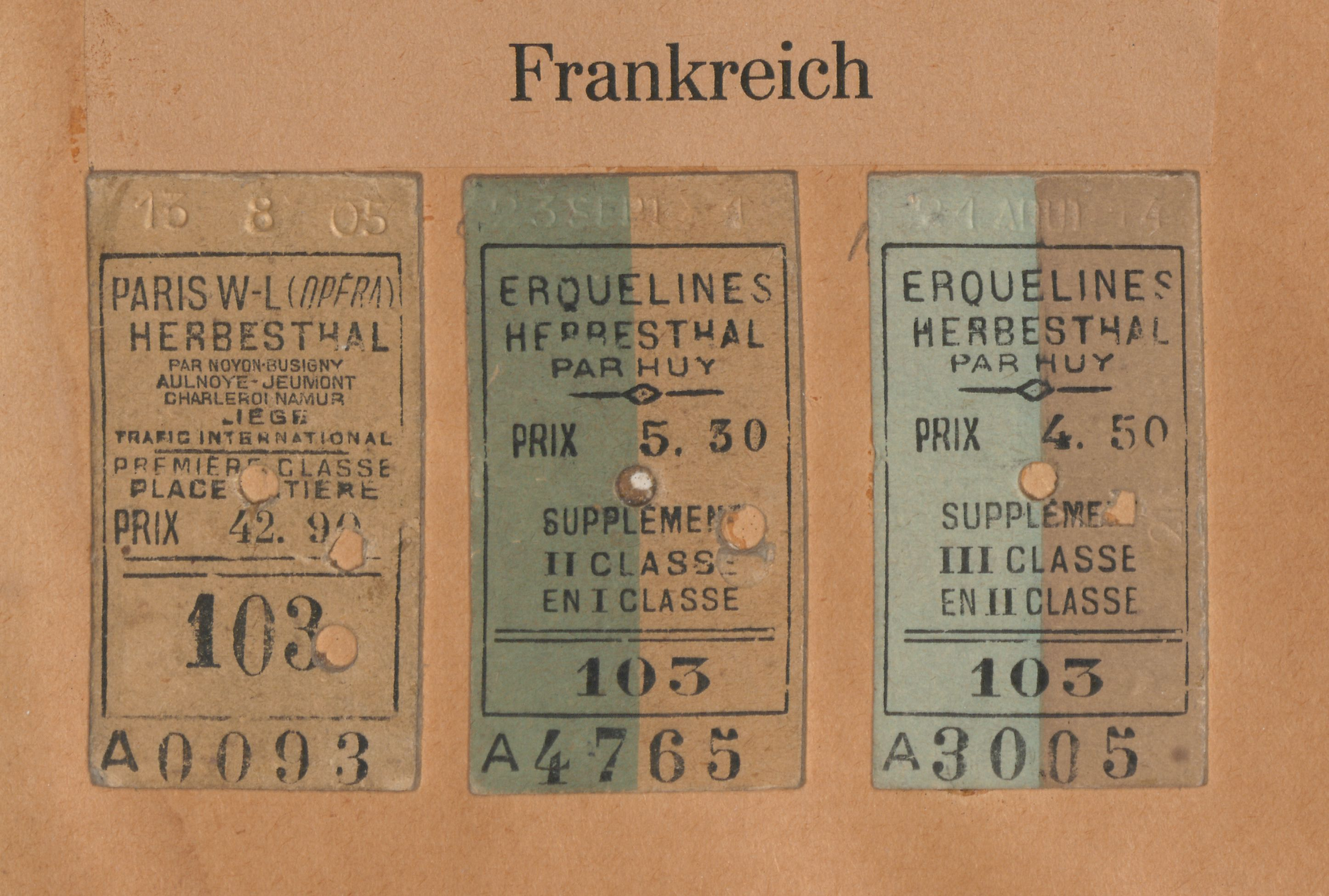 Billets/Fahrkarten der Gesellschaft Compagnie des chemins de fer du Nord von 1905 bis 1914, Strecke von Paris nach Herbesthal (Belgien). Die Tableaus mit Eisenbahnfahrkarten wurden von dem Sammler und Opernsänger Fritz Hellmuth zwischen dem Ende des 19. Jahrhunderts bis ca. 1925 erstellt. Hierfür sammelte er weltweit auf eigenen Reisen Fahrkarten oder ließ sich diese von den Eisenbahngesellschaften zuschicken. Die Sammlung wurde 1926 vom Berliner Verkehrs- und Baumuseum übernommen und ist heute im Historischen Archiv der Stiftung Deutsches Technikmuseum Berlin zugänglich.